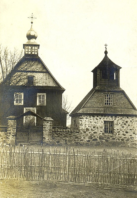 Беларуская (тарашкевіца): Латыгаль (Łatyhal). Царква